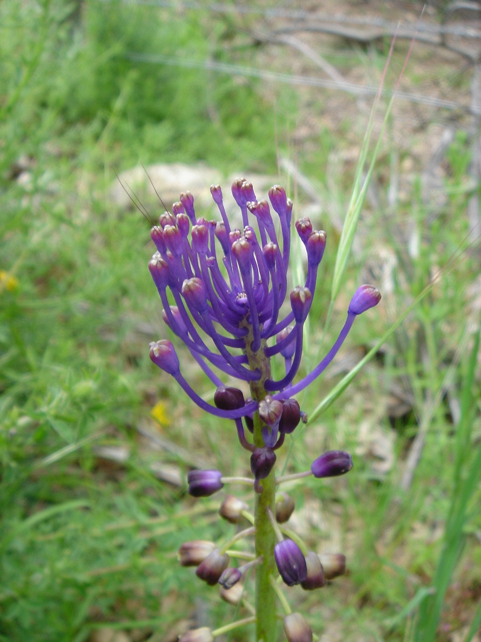 Muscari comosum